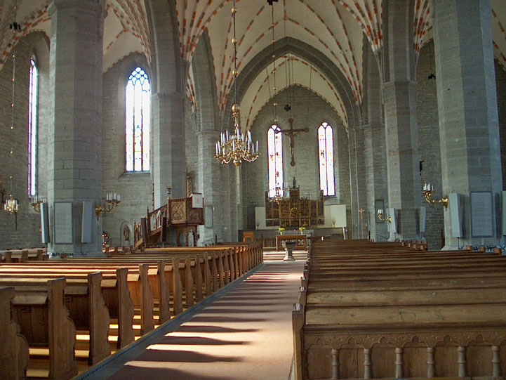 Vadstena klosterkyrka.Mittskeppet.